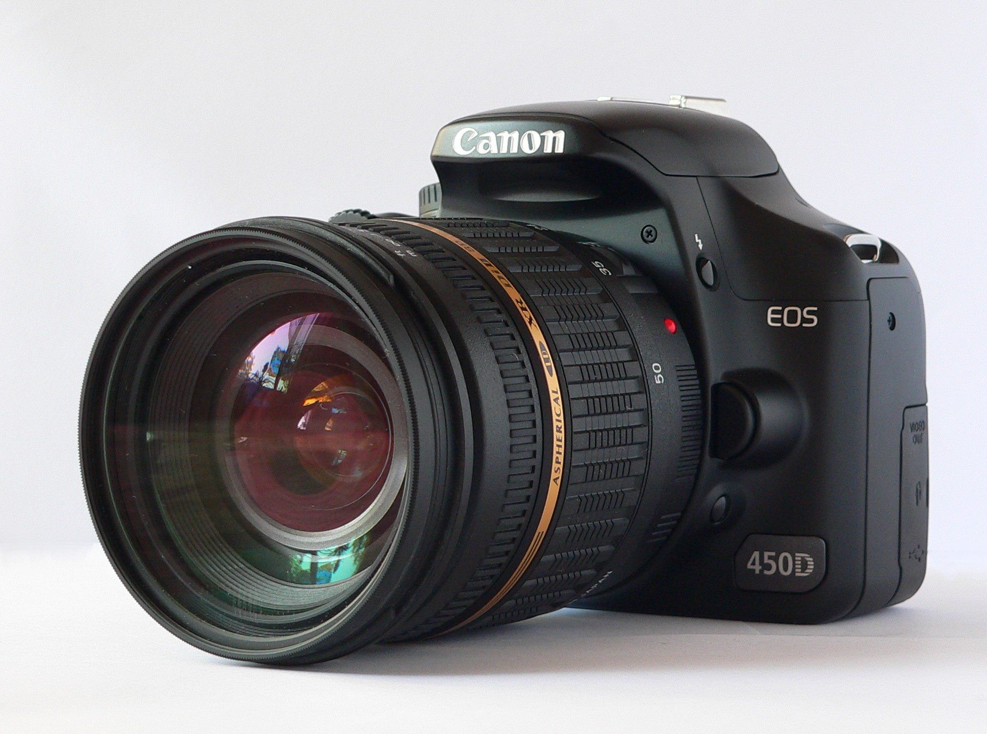 Canon EOS 450D mit Objektiv: Tamron AF 17-50mm f/2.8 SP XR Di II LD Asph.